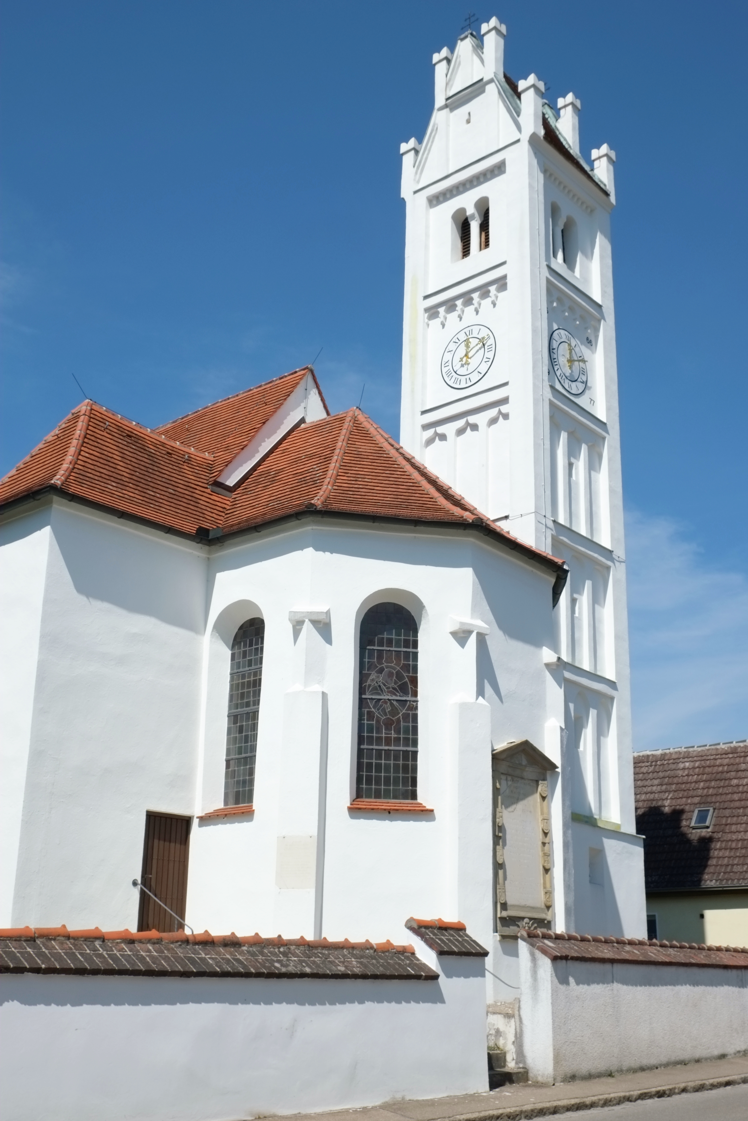 Kirche St. Martin in Aystetten im Landkreis Augsburg (Bayern Deutschland)